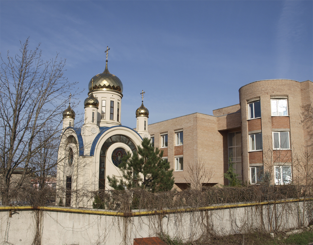 Каплиця на території податкової служби (Луганськ)